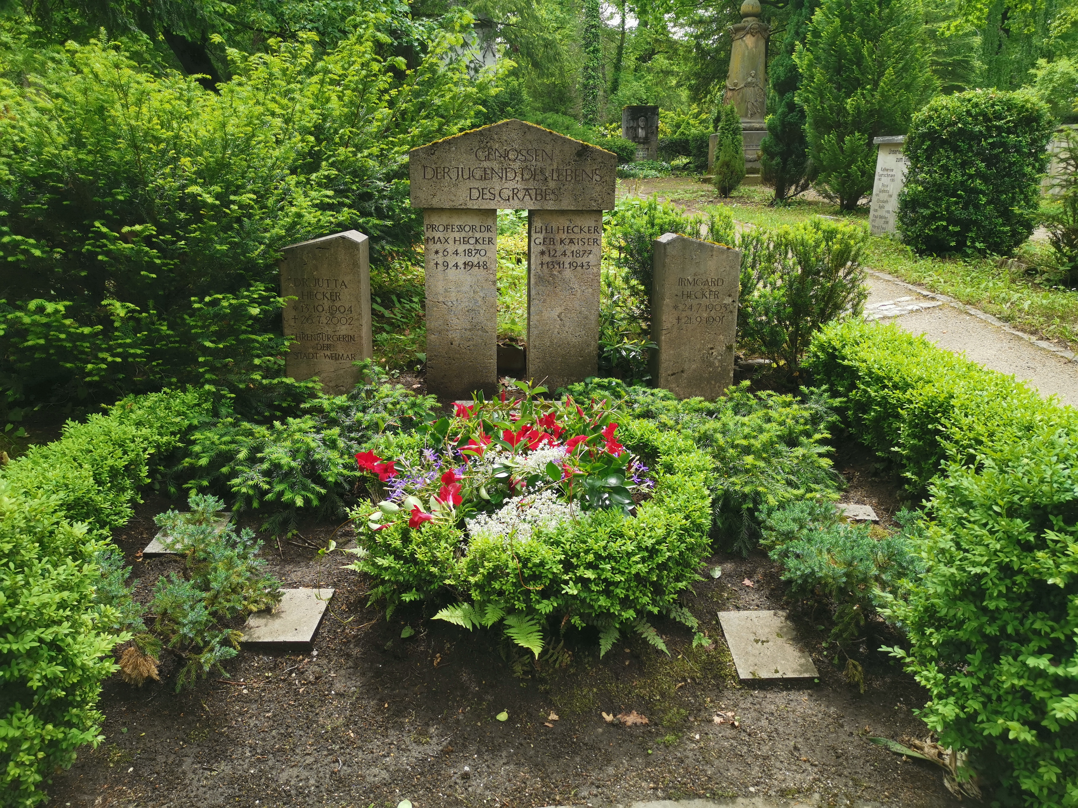 Grabstätte Familie Max Hecker; Historischer Friedhof Weimar